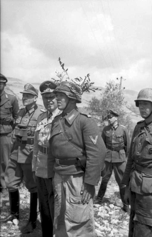 Der Feldmarschall und seine Soldaten Ein Geschützführer erklärt dem Feldmarschall [Albert Kesselring] das Ziel, auf das sein Geschütz im indirekten Schuss feuert. Bei Cassino, April 1944 ; PK XI.Flg. Kps. Information added by Wikimedia users.*